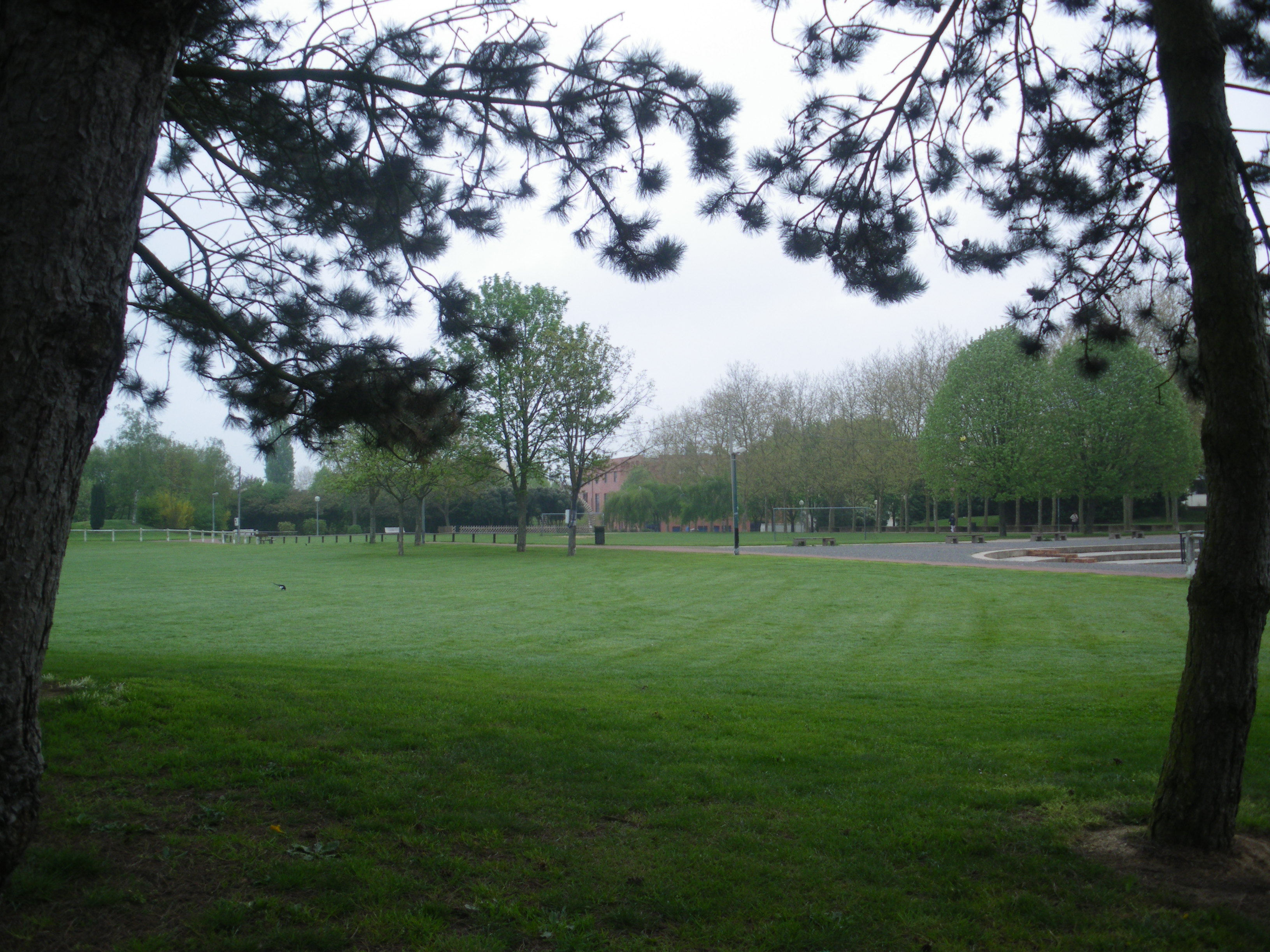 Parc Urbain les Ulis, ssonne, France